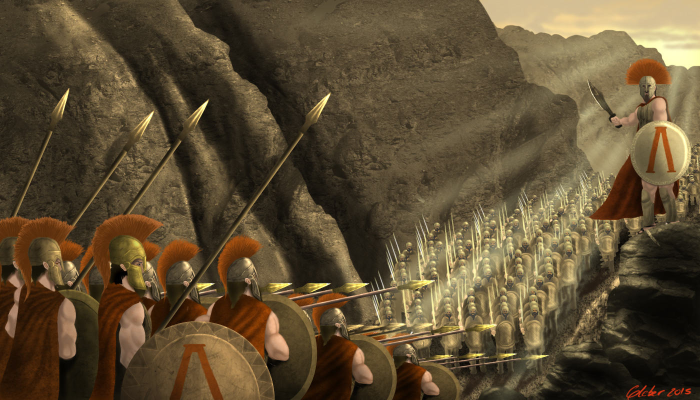 Representaçao artistica da batalha das termopilas,, desenhado em photoshop